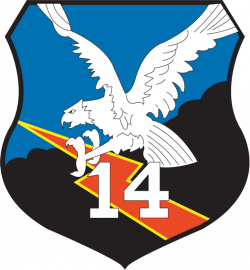 Gambar ini adalah Lambang Skuadron Udara 14, Koops AU II